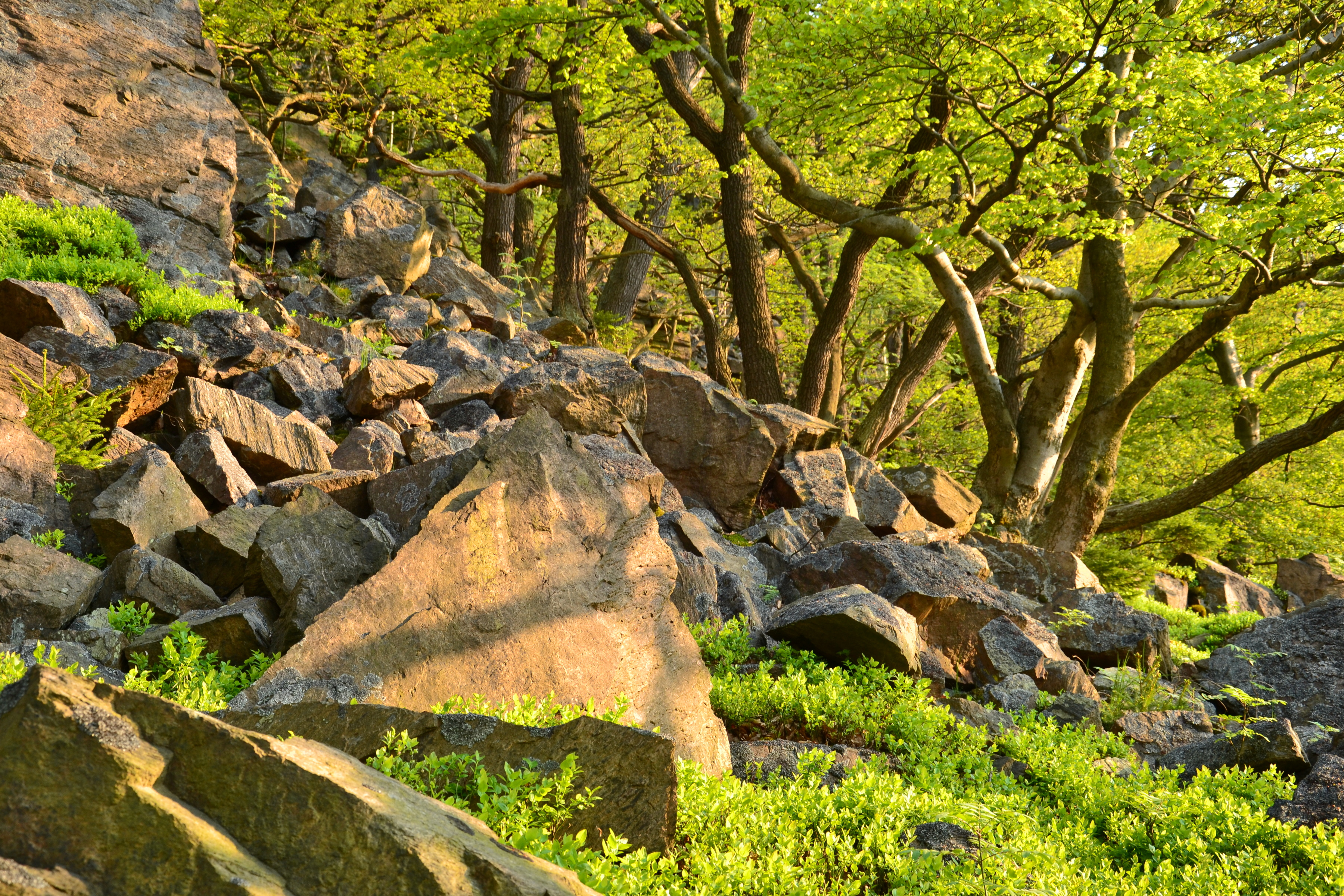 Úbočí svahu pod vrcholem